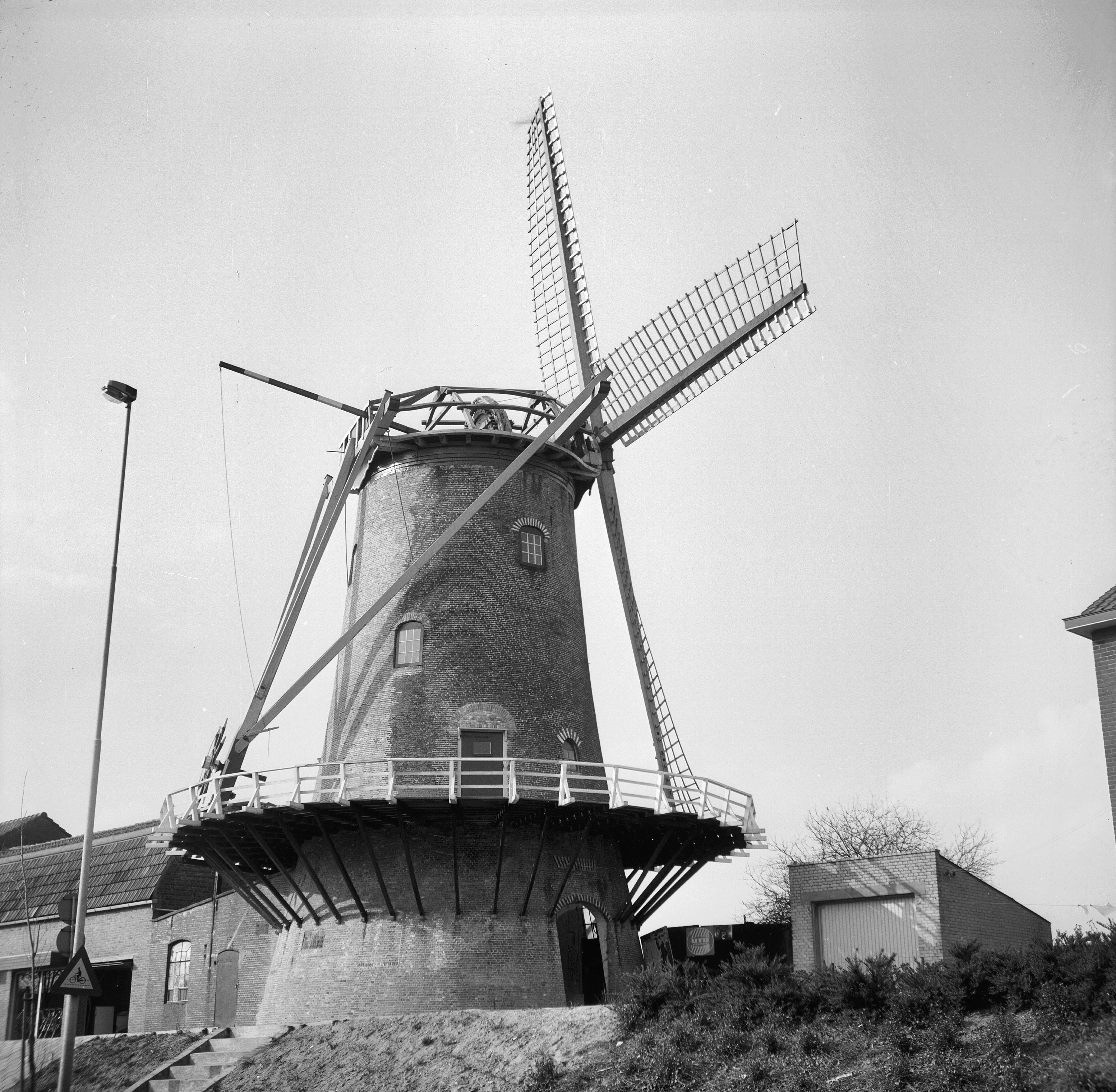 "De Korenbloem", overzicht